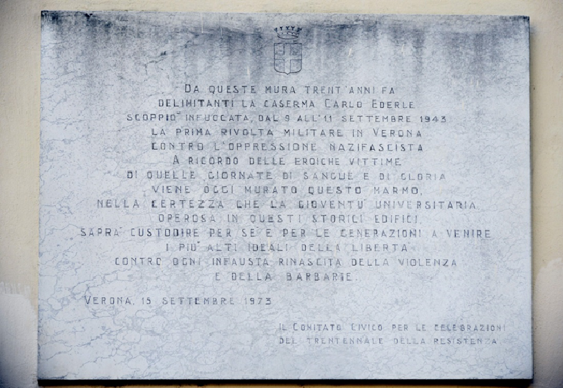 miniatura